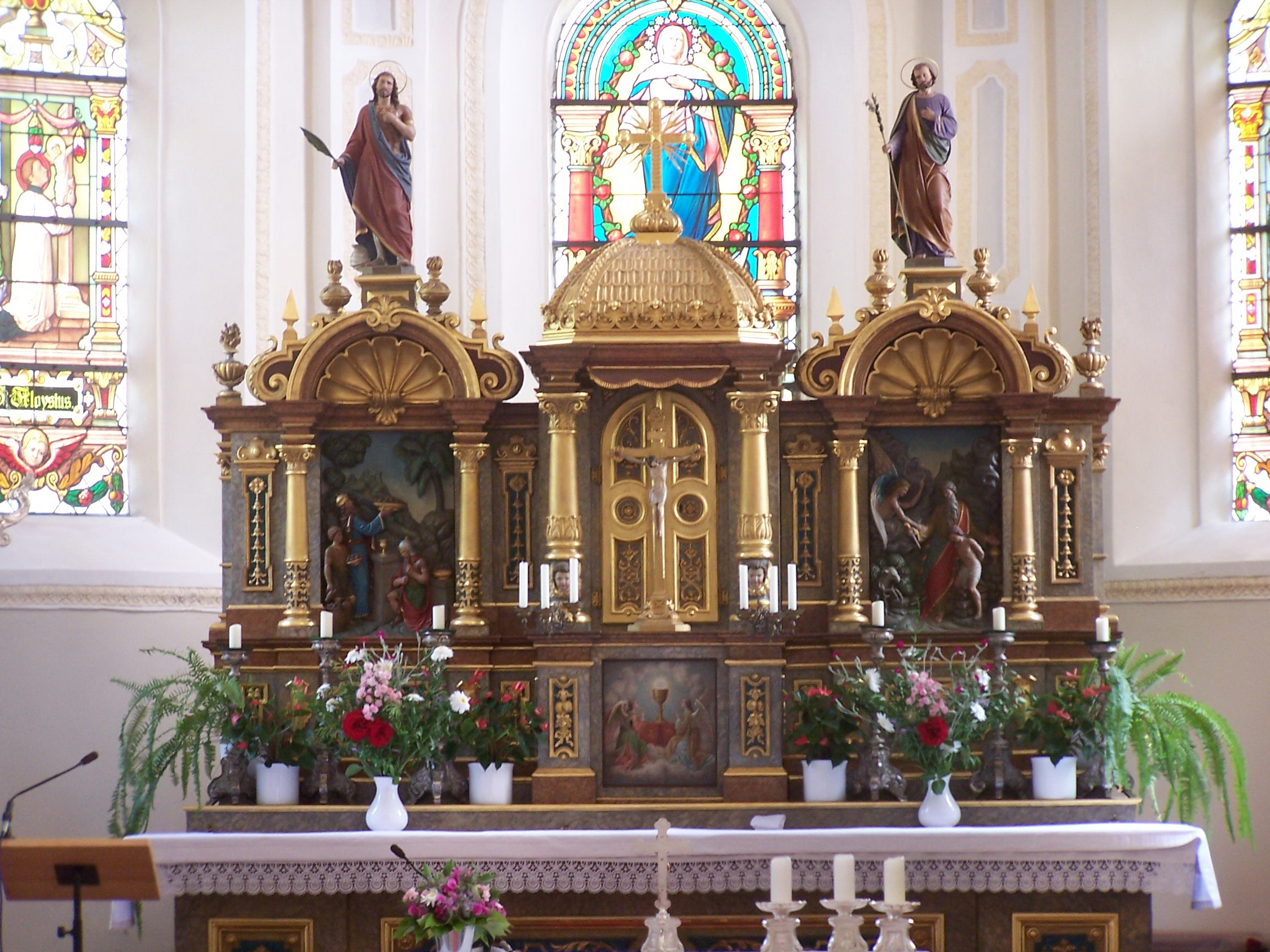 Oberglaim, Haus Nr. 46. Pfarrkirche Mariä Himmelfahrt. Saalkirche mit eingezogenem Chor und Westturm, erbaut 1694/97. Rokokoaltar aus der Mitte des 18. Jahrhunderts.